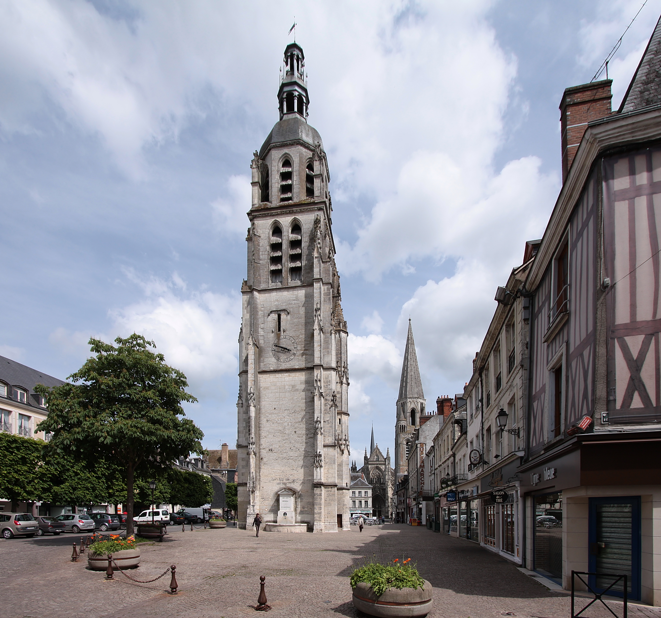 Die Kleinstadt Vendôme im Département Loir-et-Cher/Frankreich - Place St-Martin im Stadtzentrum mit dem Turm der ehemaligen Kirche Saint-Martin und im Hintergrund die Kirche der ehemaligen Dreifaltigkeits-Abtei.